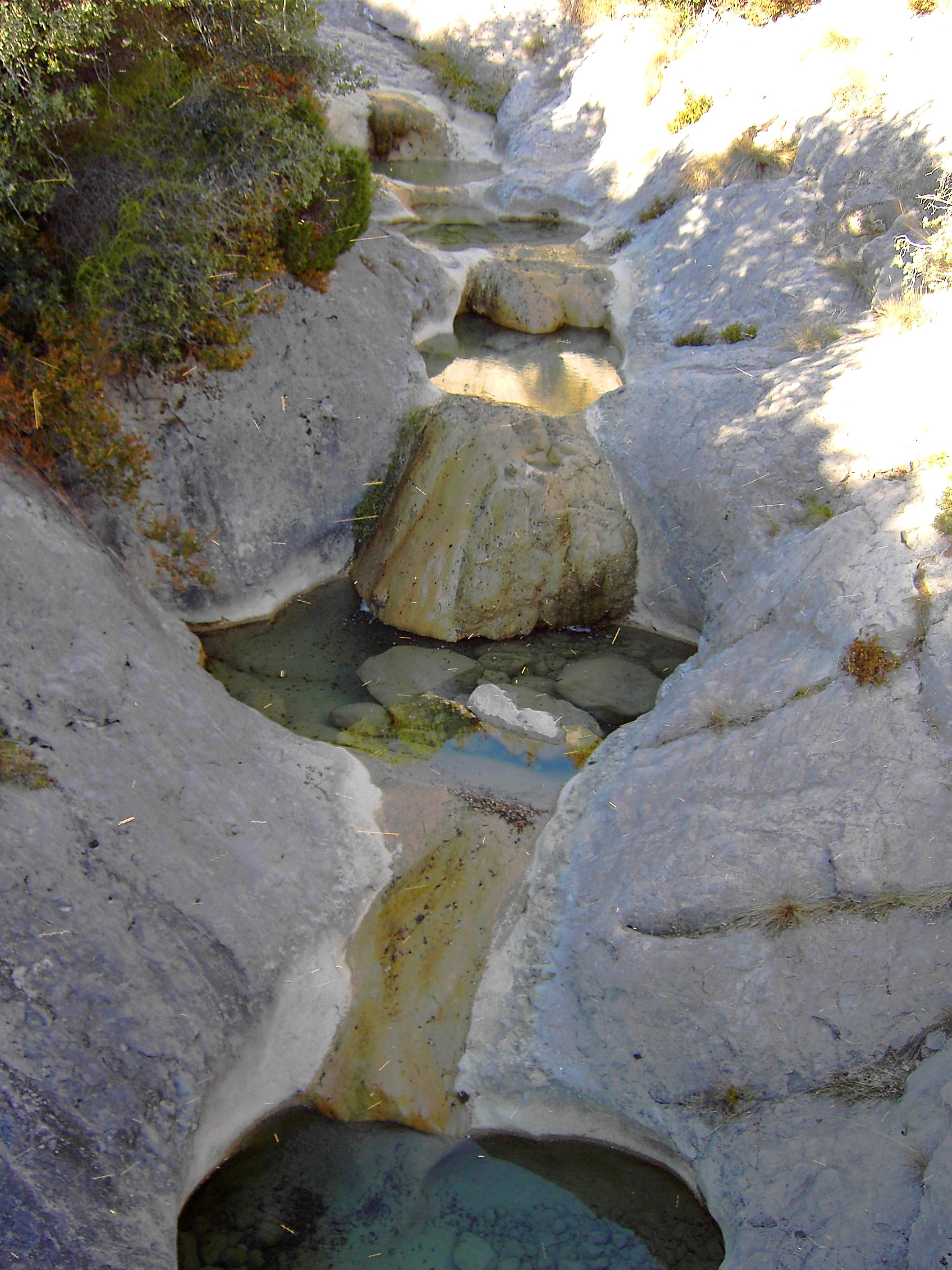 Barranco de Ascaso.